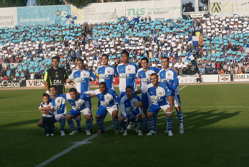 Alineació del CE Sabadell davant l'Eibar